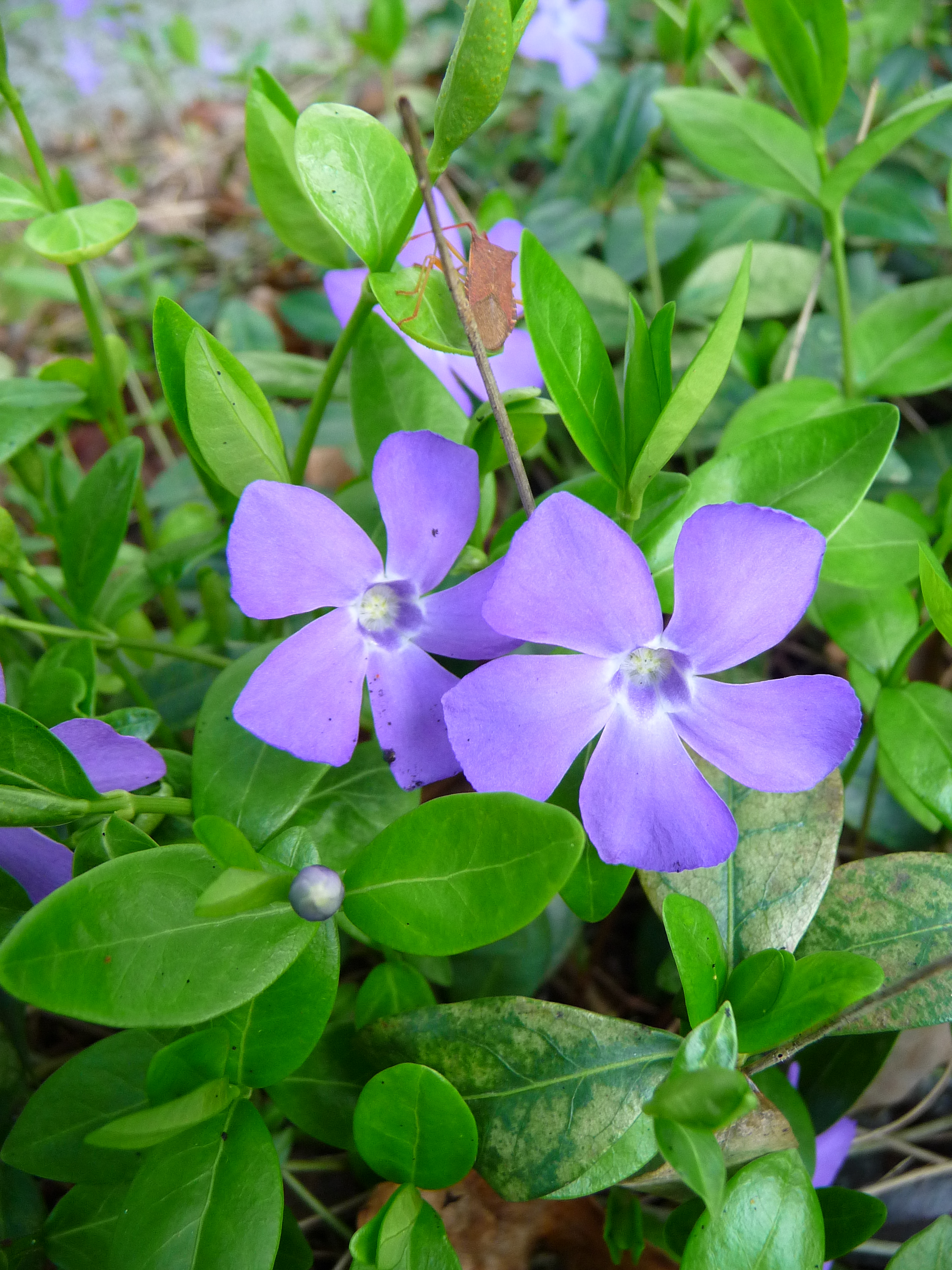 Blaue Blüten des Kleinen Immergrün (Vinca), fotografiert in Nordbaden (Baden-Württemberg, Deutschland)